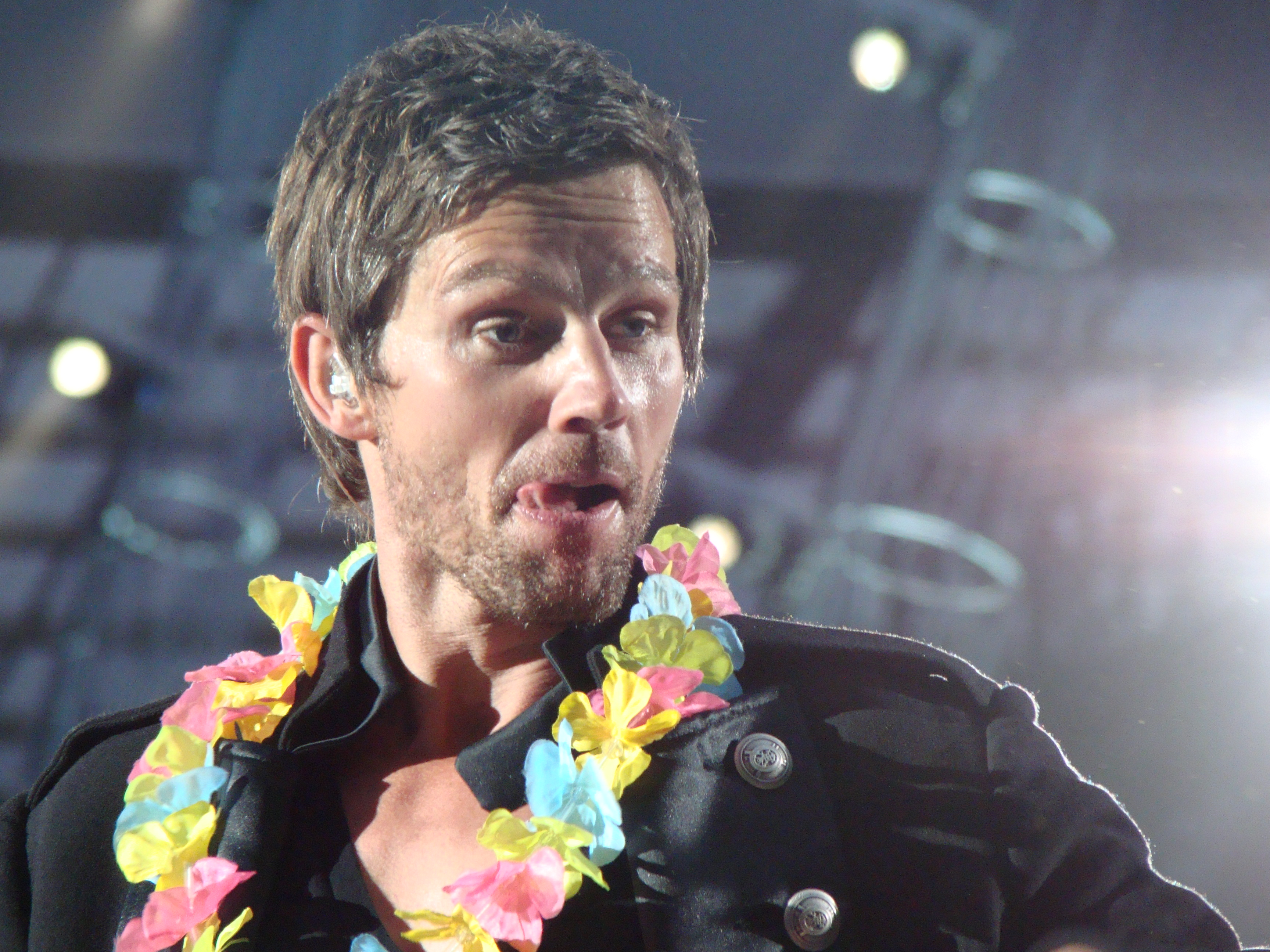 Take That